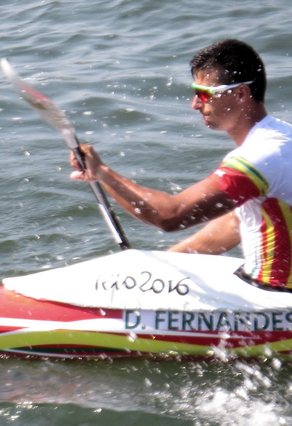 Sx50